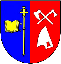 znak obce Vidče